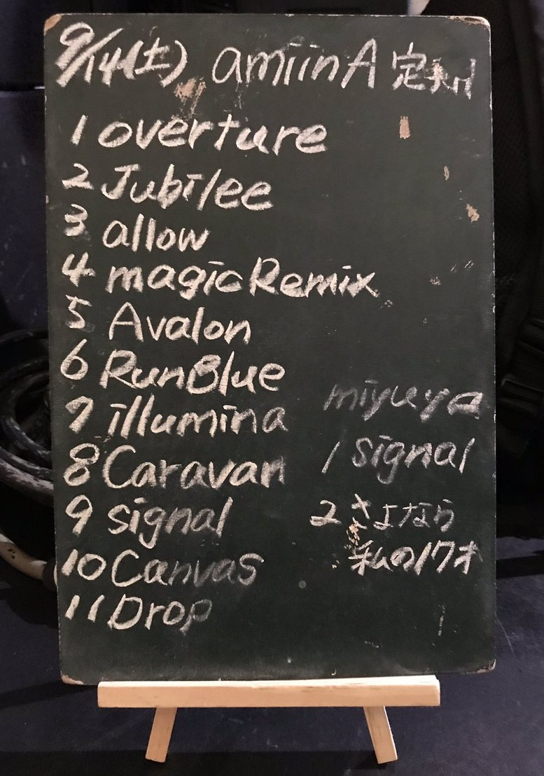 amiinAセトリボード